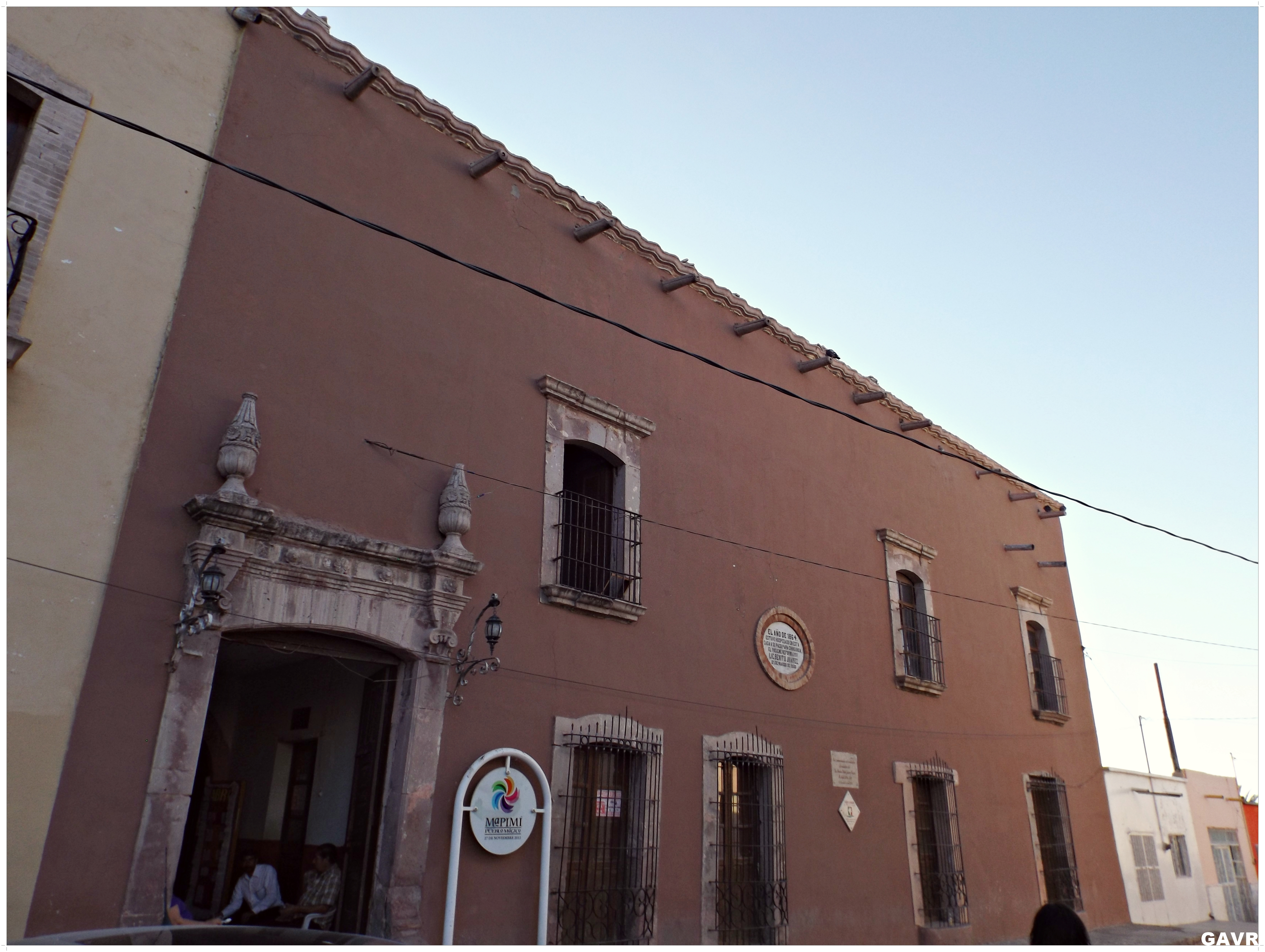 casa donde vivio benito juarez